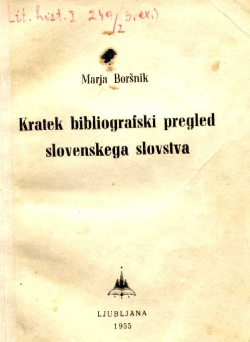 Naslovnica Kratkega bibliografskega pregleda slovenskega slovstva Marje Boršnik, 1958.